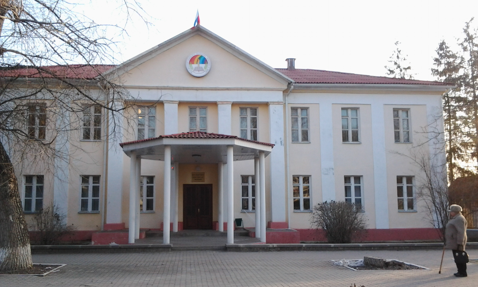 Поселок Ровеньки Белгородской области